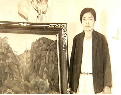 나혜석, 그림 전시회에서